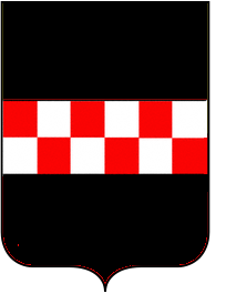 Quarrata Stemma